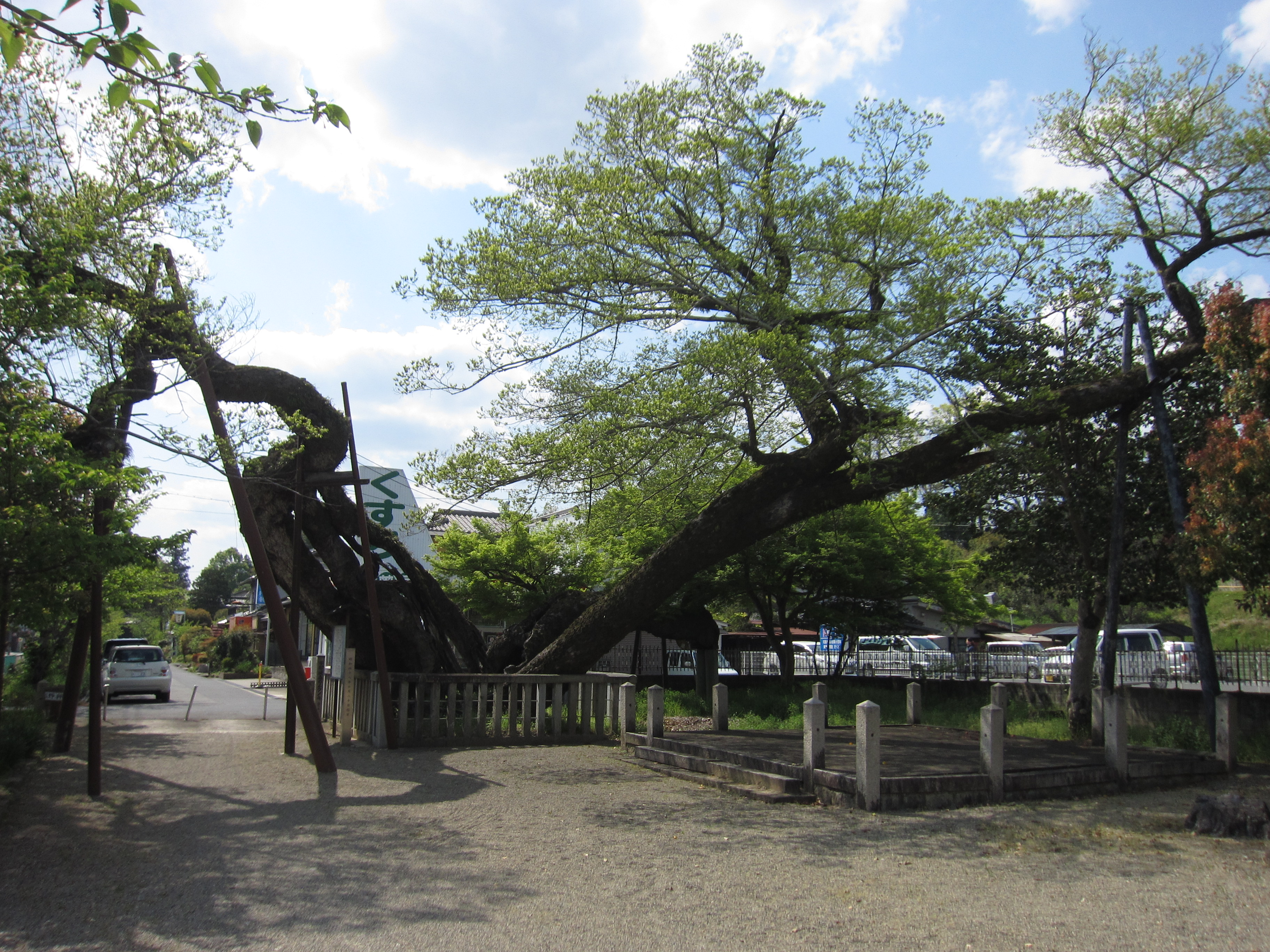 高野神社 (津山市二宮) ムクノキ